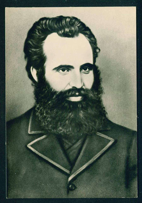 Portrait des bulgarischen Schriftstellers Ljuben Karawelow.